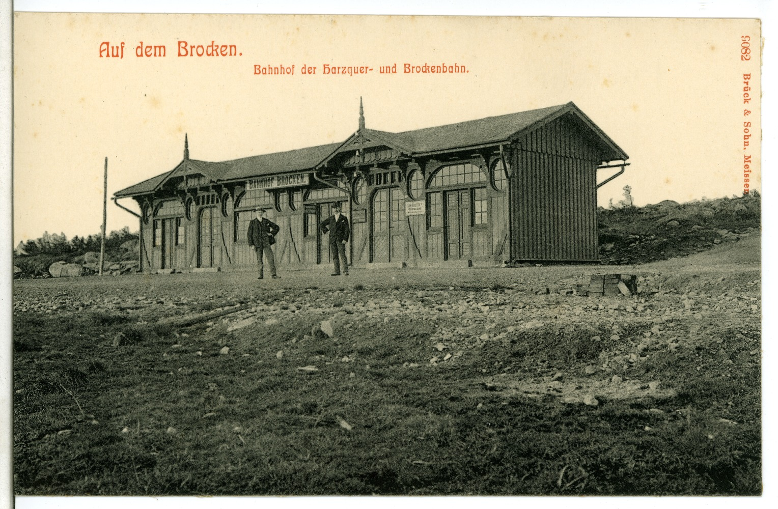 Brocken; Bahnhof der Harzquer- und Brockenbahn This postcard is from publisher Brück & Sohn in Meißen ( postcard has a unique number 09082 and is available in a higher resolution at the publisher. This images was uploaded in a cooperation project between Wikipedians and the publisher.